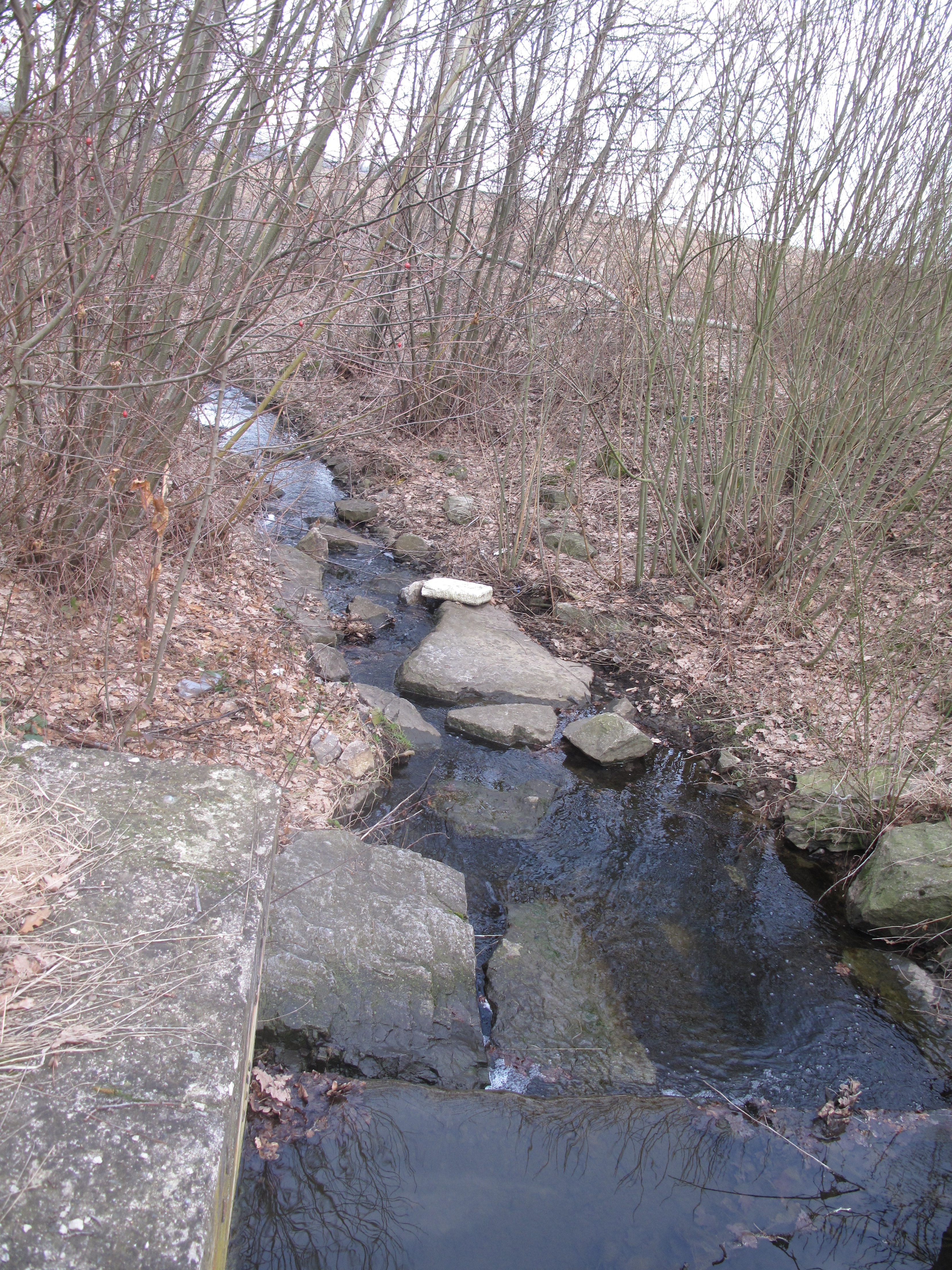 Milíčovský potok pod Vrahem